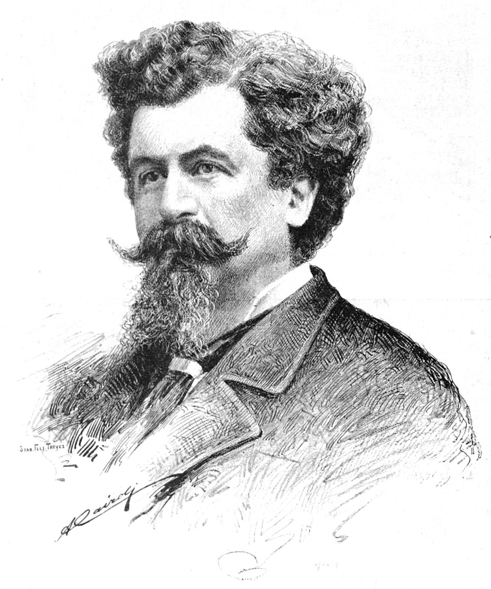 Ritratto di Francesco Barzaghi nel 1886